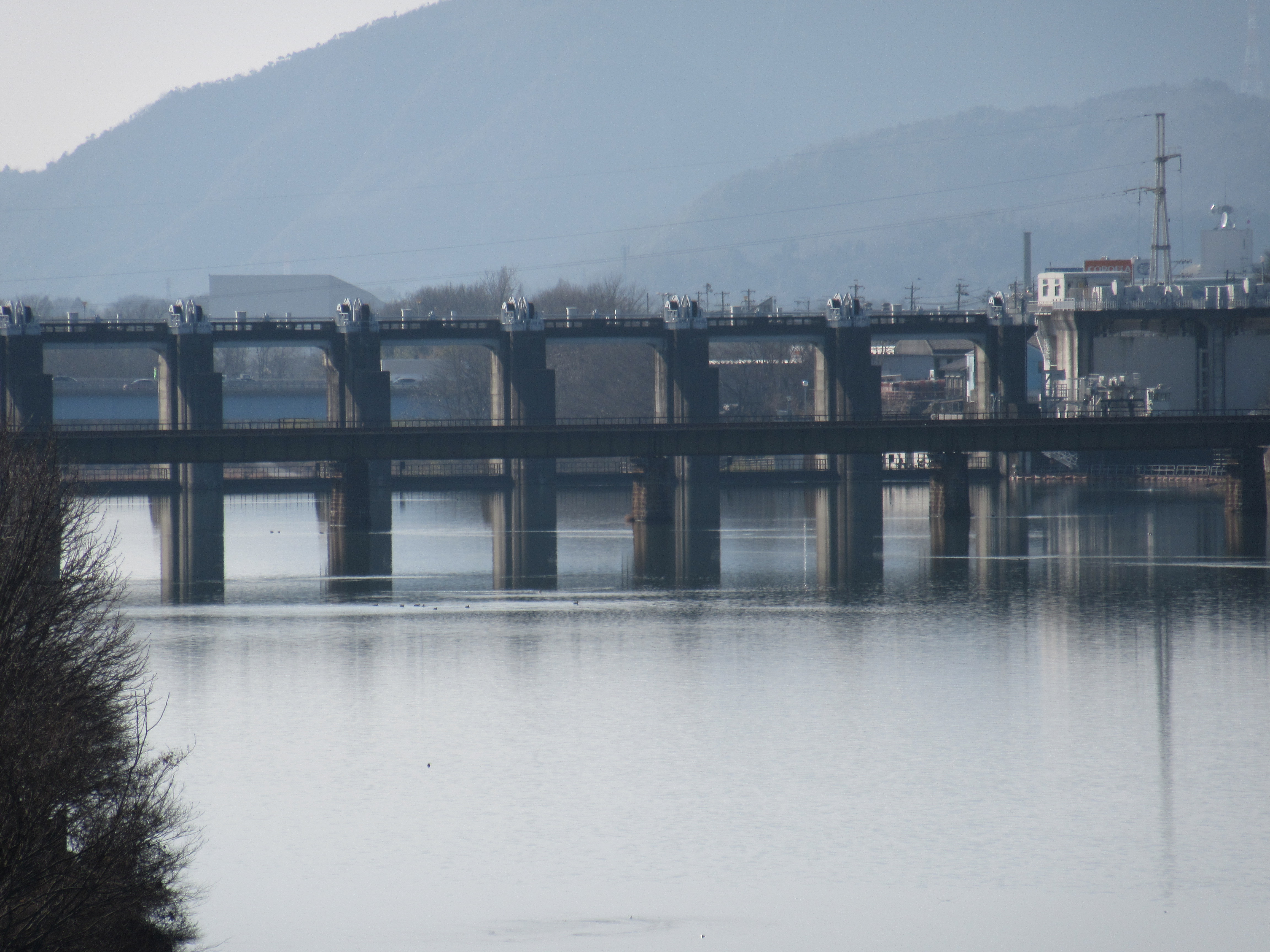 木曽川橋梁 (太多線)